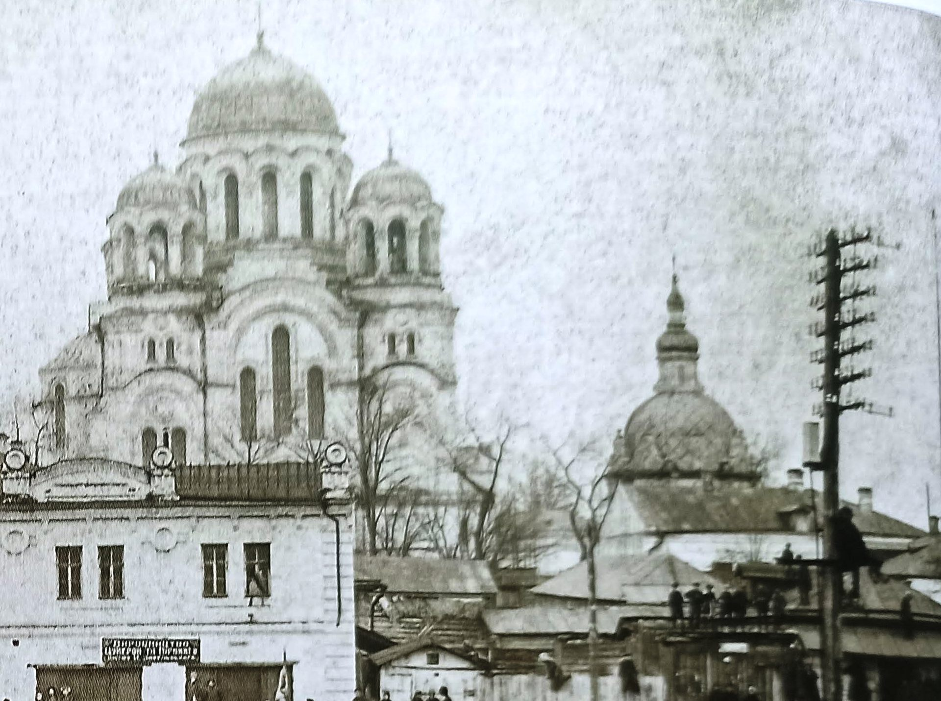 Трьоханастасіївська церква та Анастасіївська каплиця (справа) 1927 р. Північний фасад.